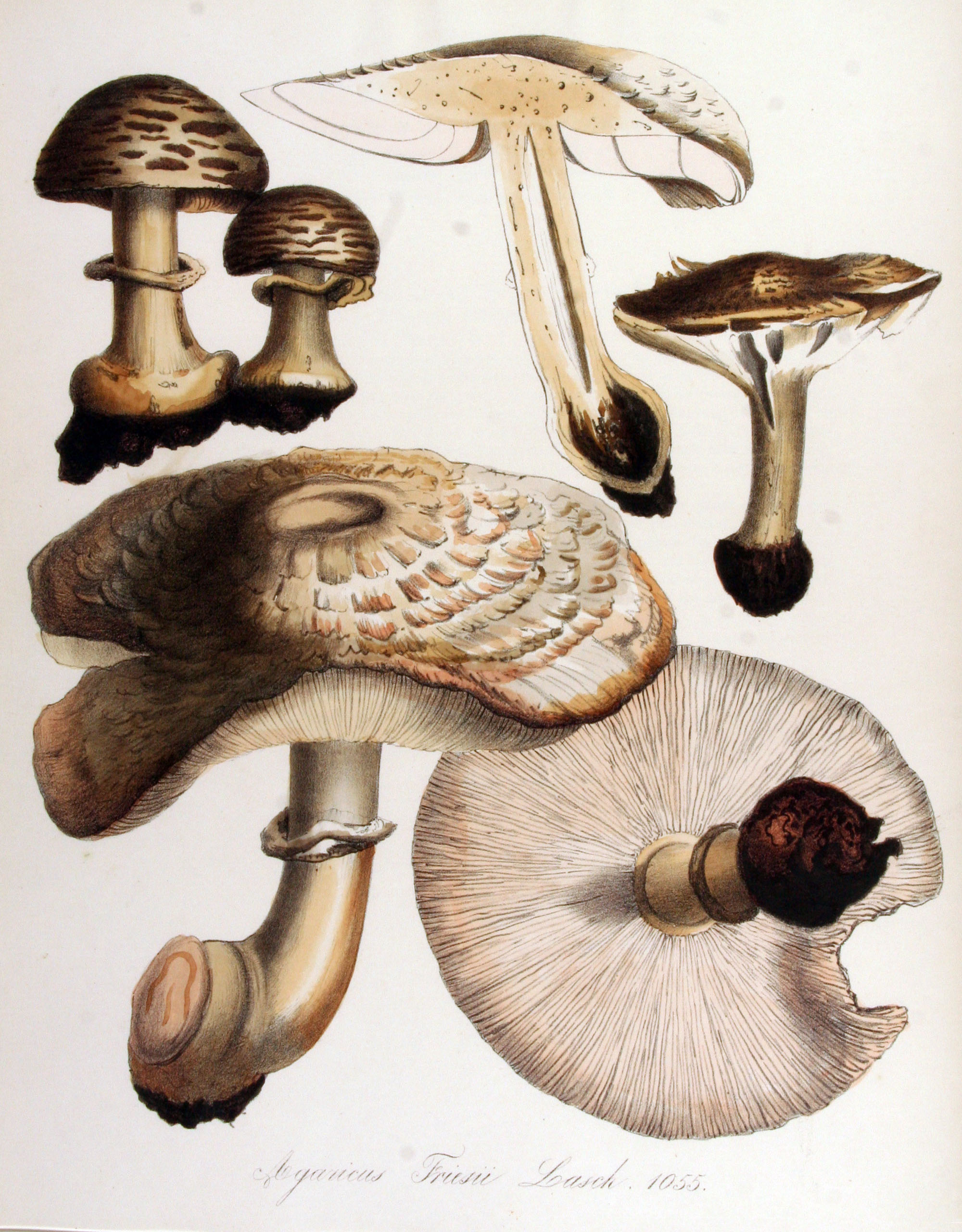 Agaricus friesii